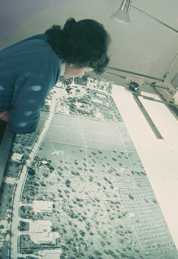 Impiego del fotopiano nel censimento dei trulli della Valle d'Itria